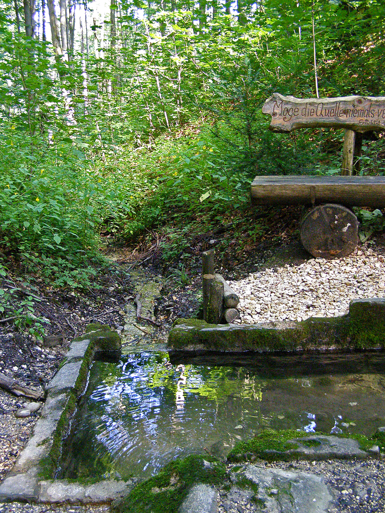 Fluss Kammel - Quelle im Wald Hochfirst bei Erisried